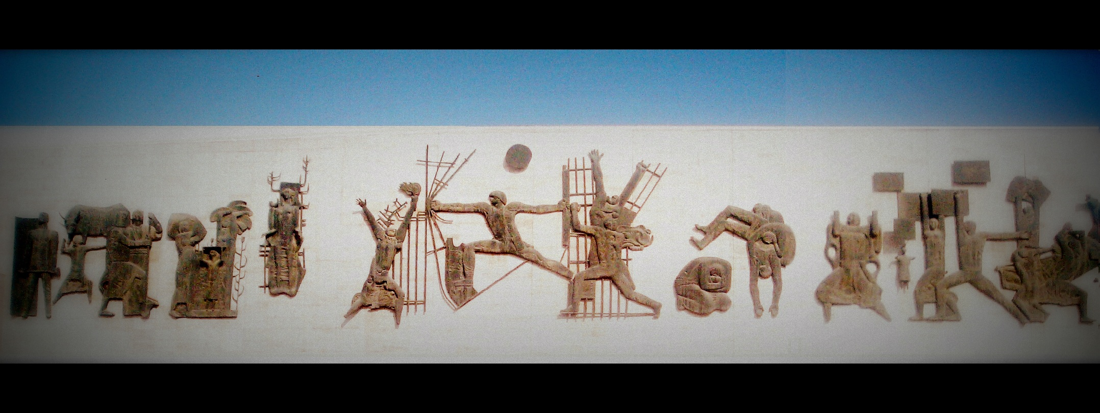 Verk av skulptören Artis Jawad Salim. En av de viktigaste inslagen i Iraks kultur i modern historia. 1958